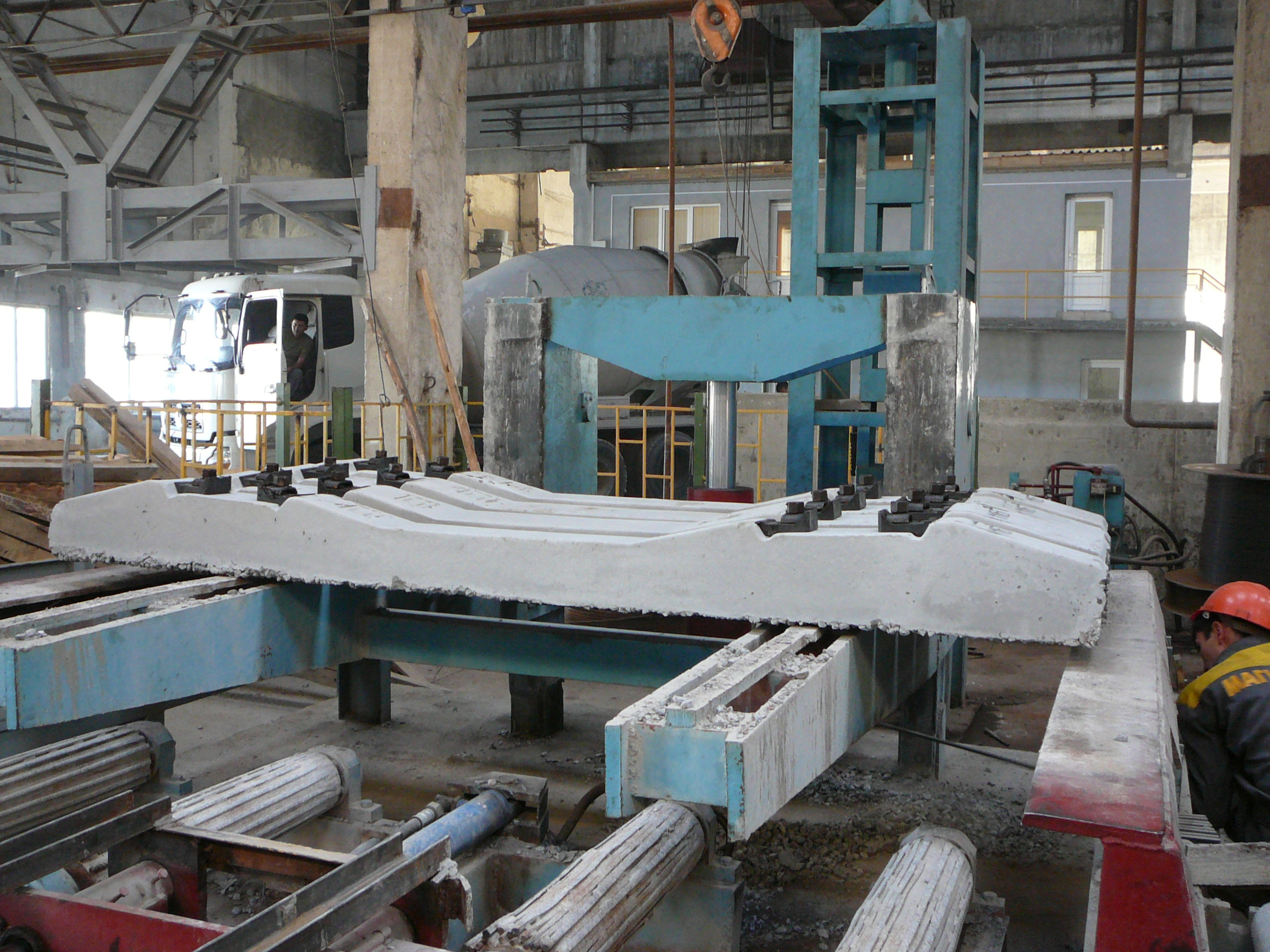 Железобетонные шпалы после выемки из формы. Завод по изготовлению шпал в пос.Заречный Алматинской области. Октябрь 2011 года.